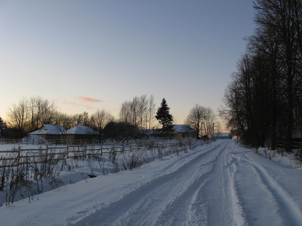 деревня Шаробыки